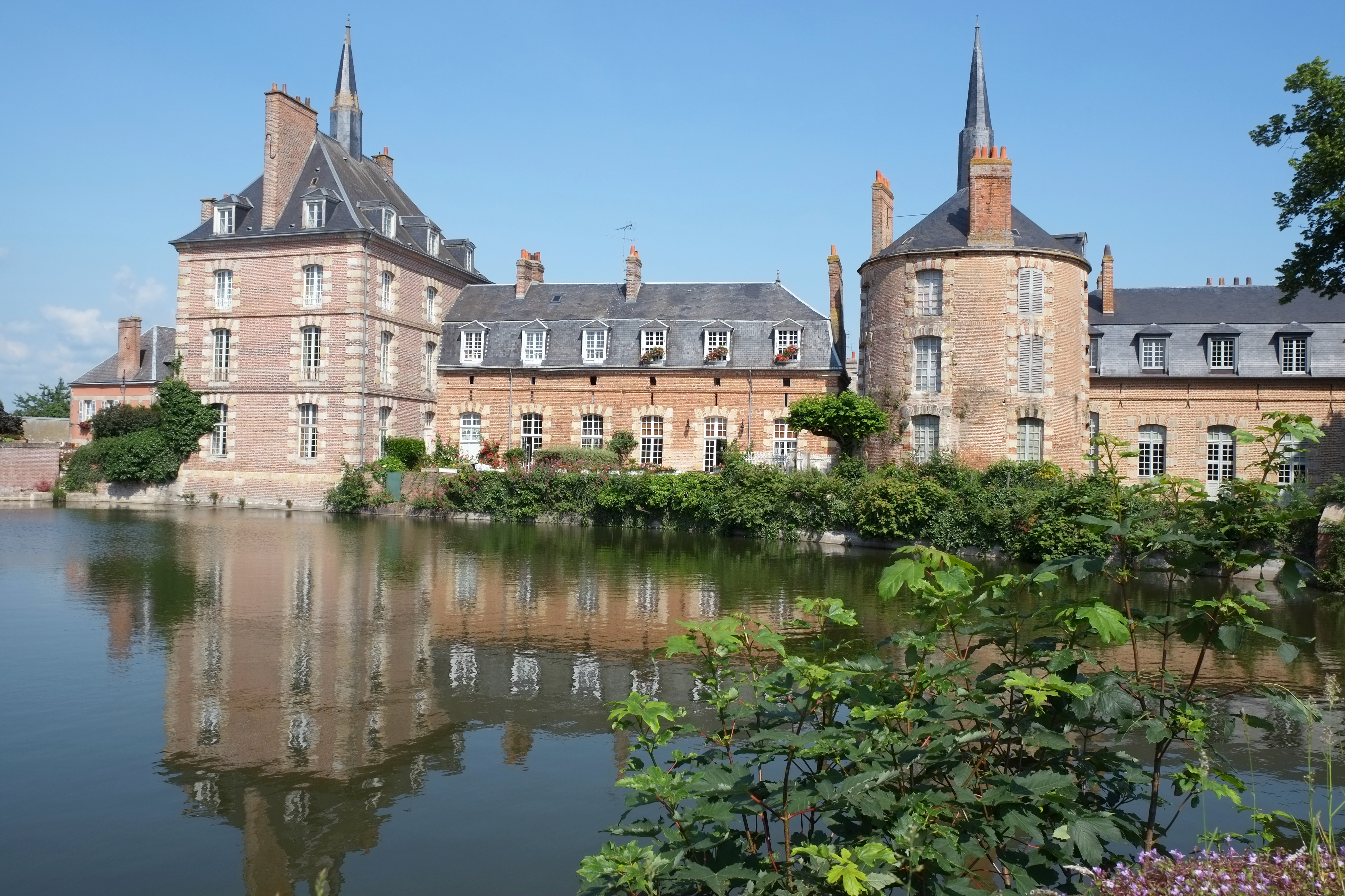 Schloss in Bellegarde (Frankreich)